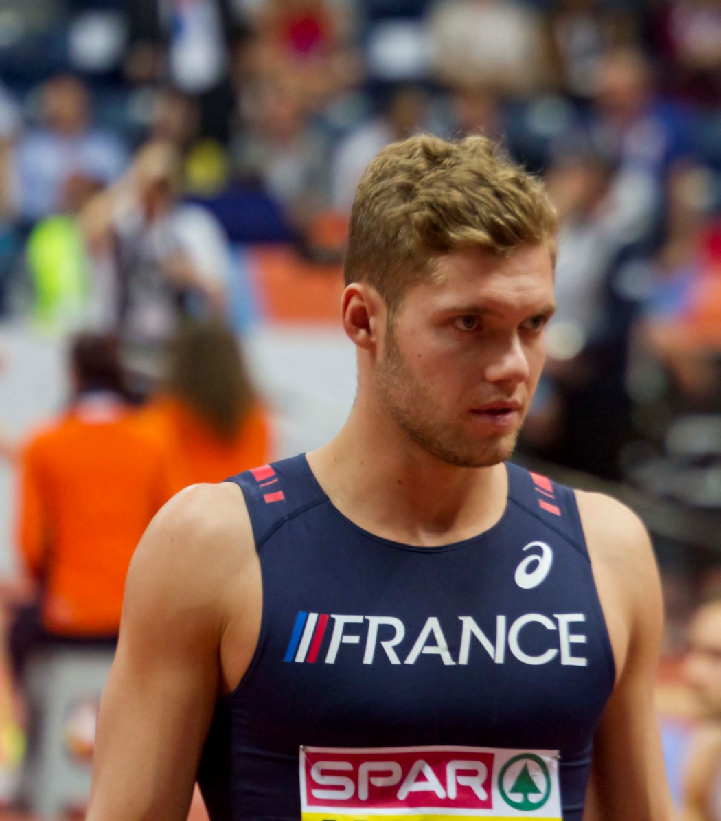 127 kevin mayer